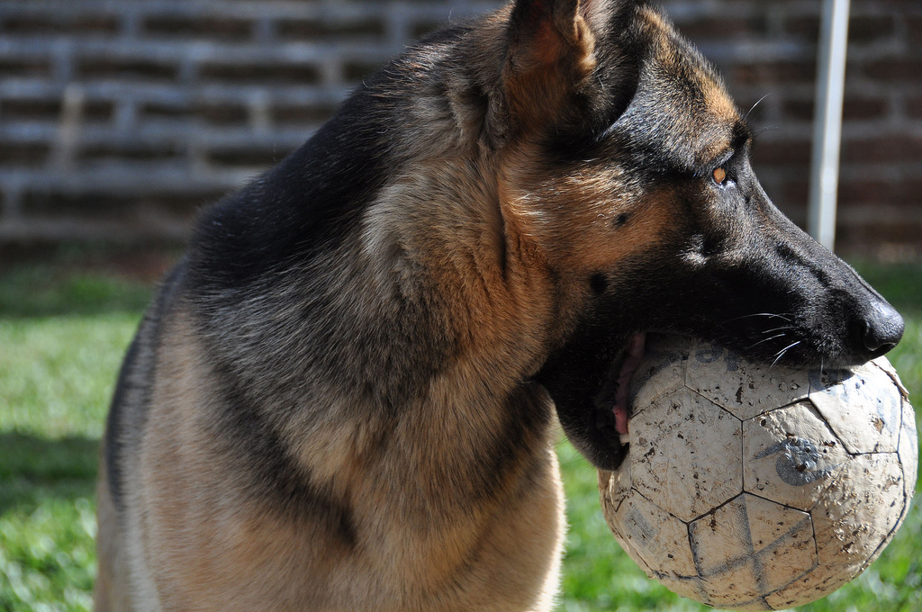 La hundo tenas pilkon